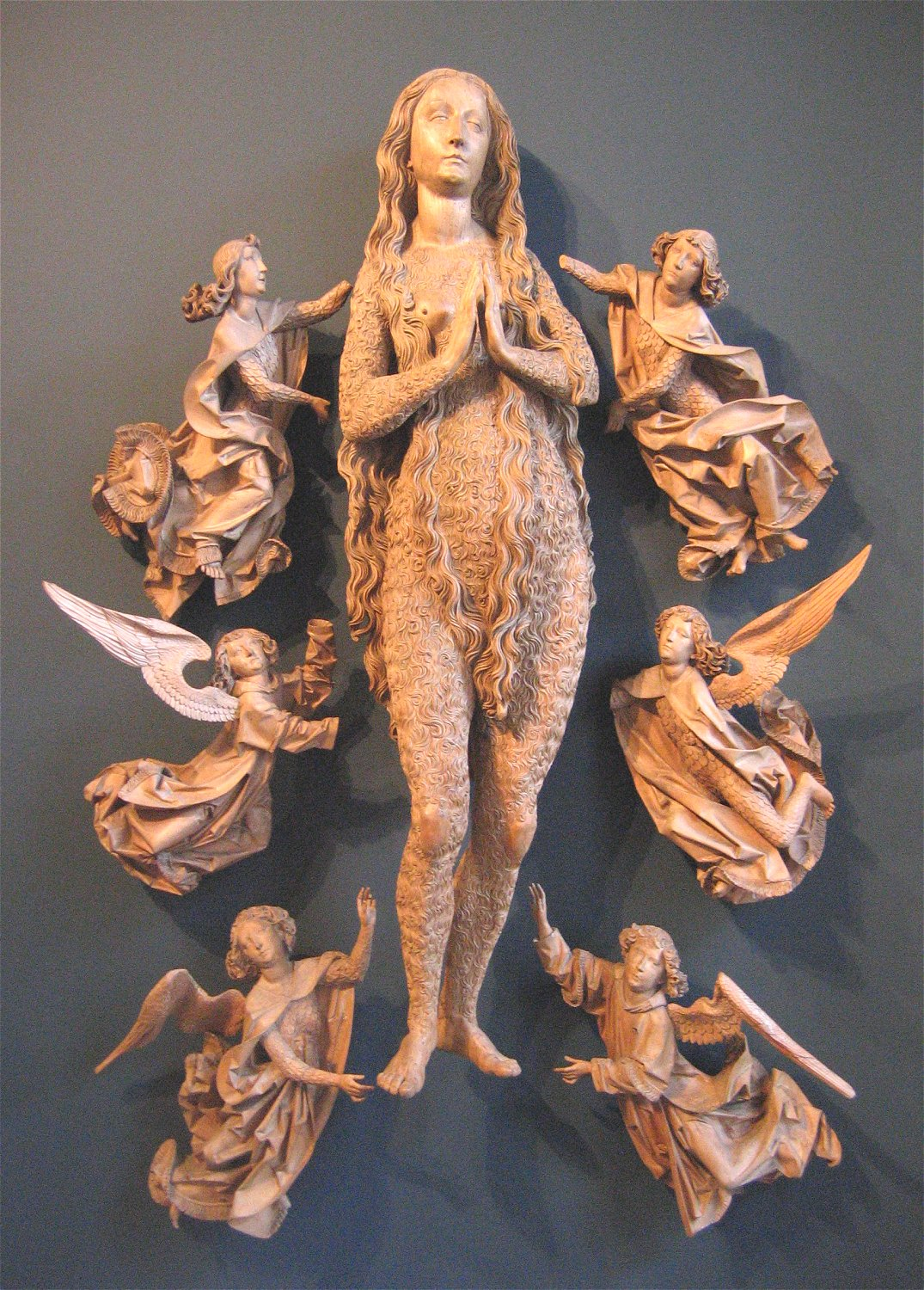 Tilman Riemenschneider, Heilige Magdalena von Engeln erhoben, aus dem Hochaltar von Münnerstadt, 1490/92, Bayerisches Nationalmuseum